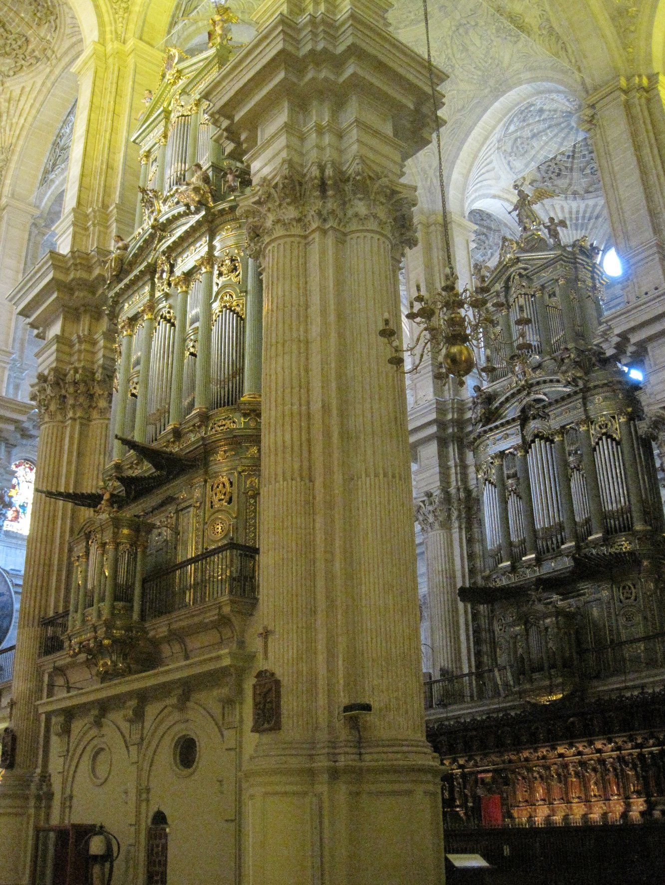 Beide Orgeln der Kathedrale in Malaga, Spanien